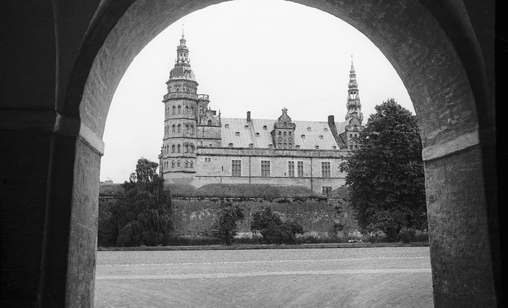 Kronborg Castle in Helsingoer, known to be the castle where Shakespeare's play "Hamlet" is enacted. The Renaissance castle was built in 1574–1585. Kronborgs slott i Helsingör, känt för att vara slottet där Shakespeares pjäs "Hamlet" utspelar sig. Renässansslottet byggdes 1574–1585. Location: Helsingør, Själland, Sjaelland (Zealand), Denmark, Danmark Photograph by: Berit Wallenberg Date: 03.07.1934 Format: Film Persistent URL: Read more about the photo database (in english)